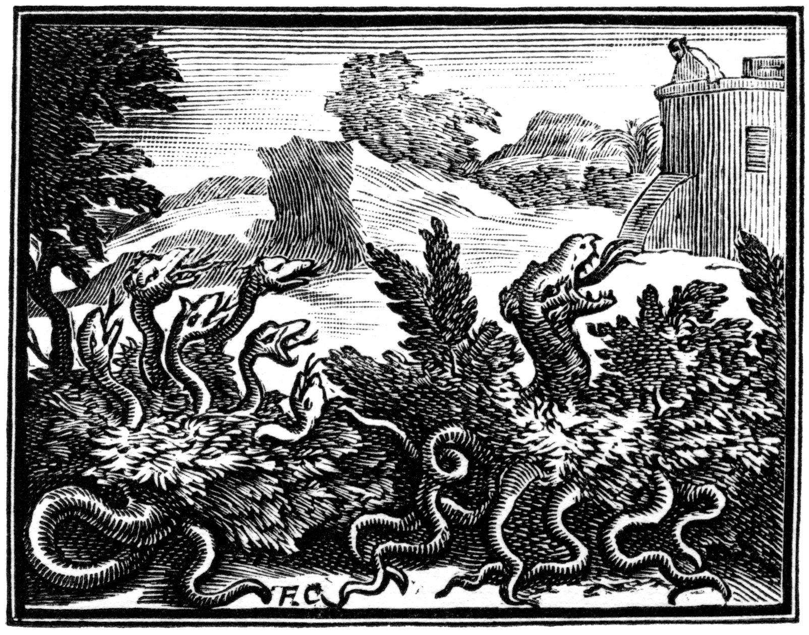 Illustrations pour les « Fables choisies mises en vers par M. de la Fontaine », Claude Barbin et Denys Thierry, Paris, 1668 (premier recueil) 1678-79 (deuxième recueil) 1694 (troisième recueil). Numérotation Charpentier (1705).